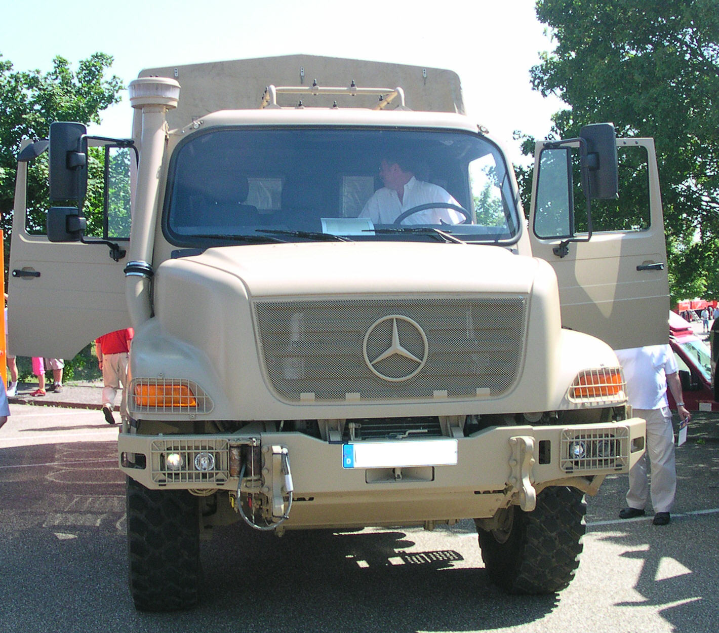 Oldtimertreffen bei Daimler Chrysler in Wörth am Rhein. Mercedes Militär-LKW S 2733 A 6x6, Motor 926917, 240 kW (326 PS), 1300 Nm bei 1200-1500/min